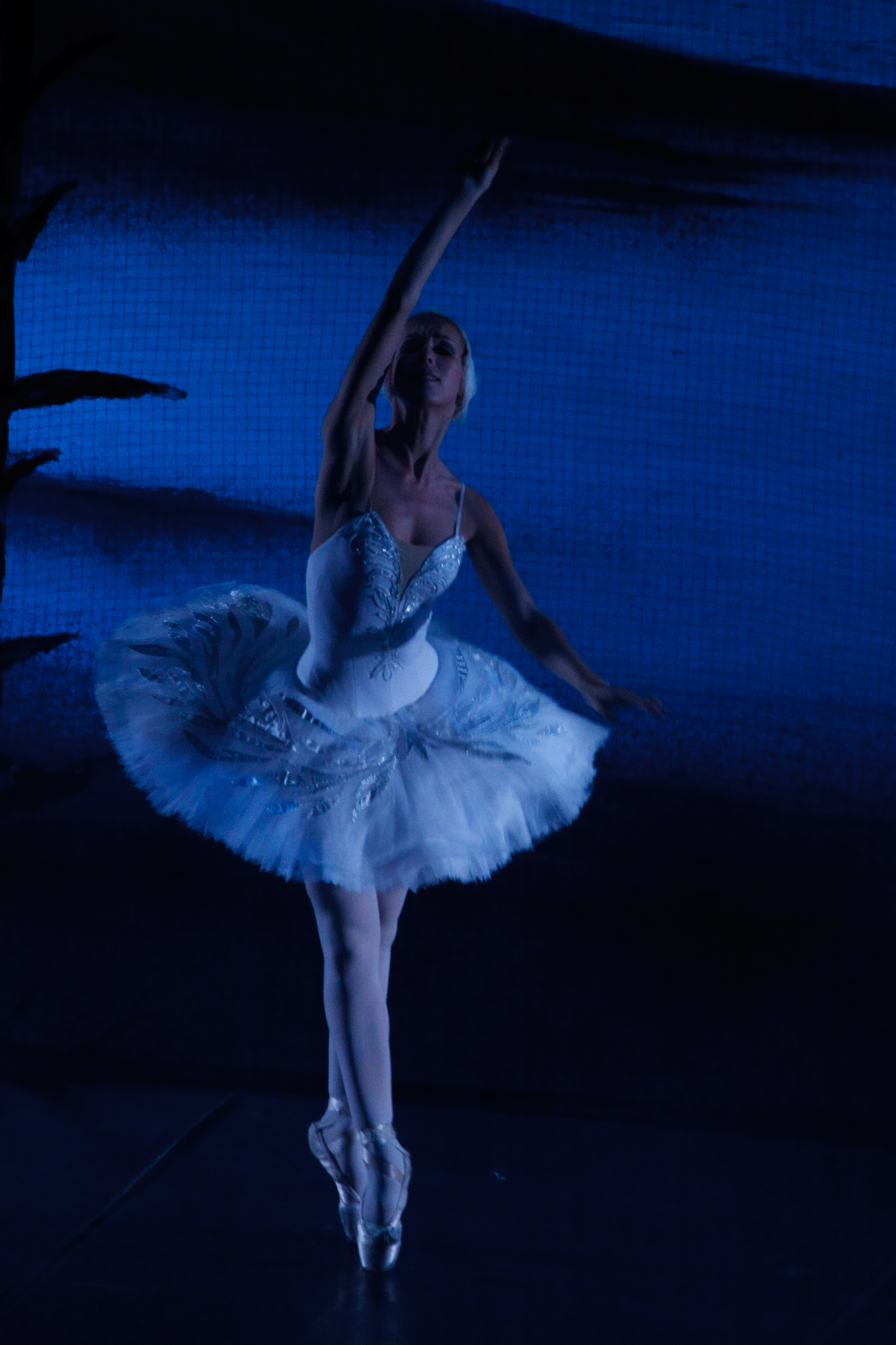 «Лебединое озеро» на сцене Александринского театра.